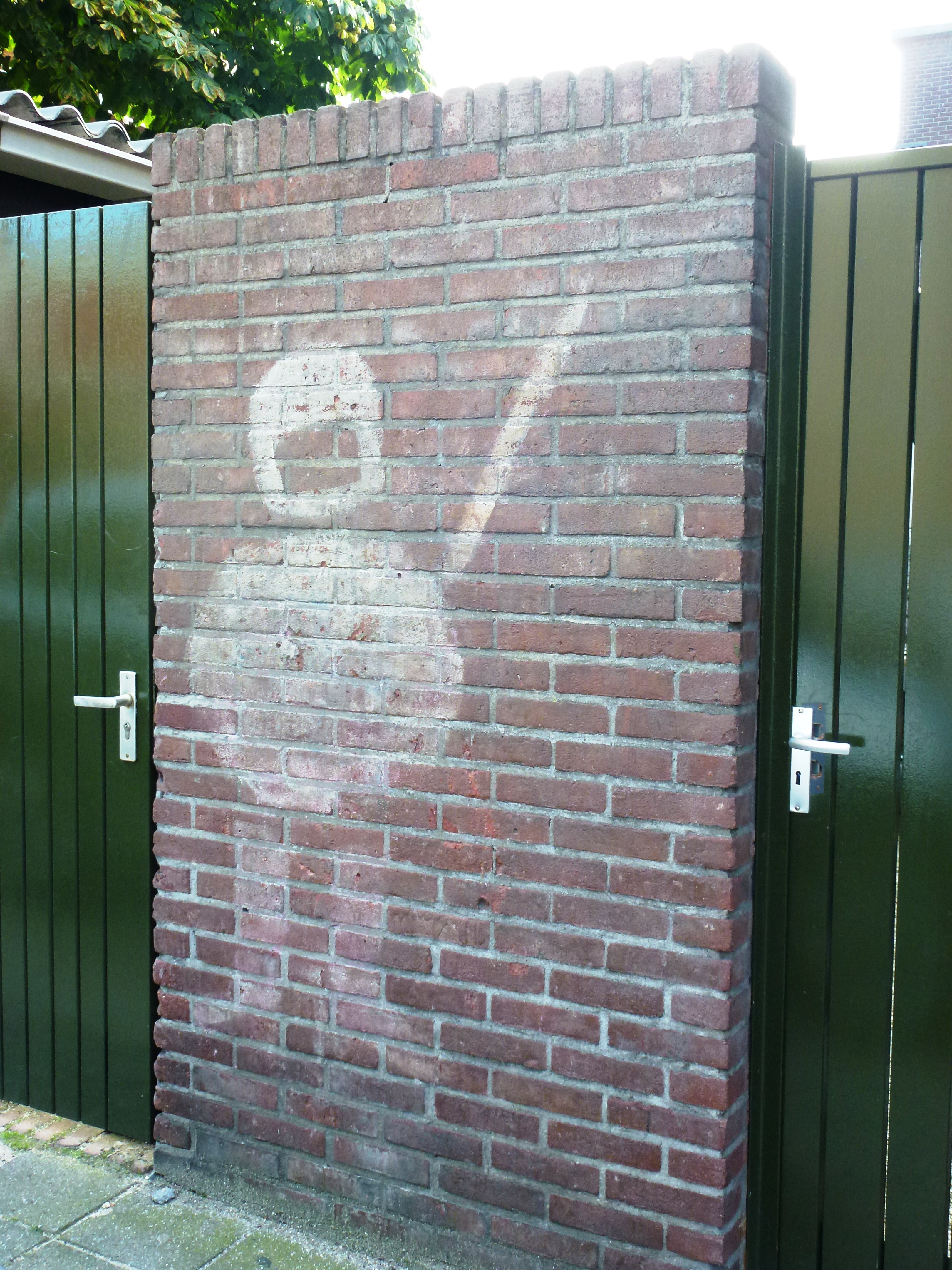 Nijmegen Piersonstraat bij 33, Piersonmannetje